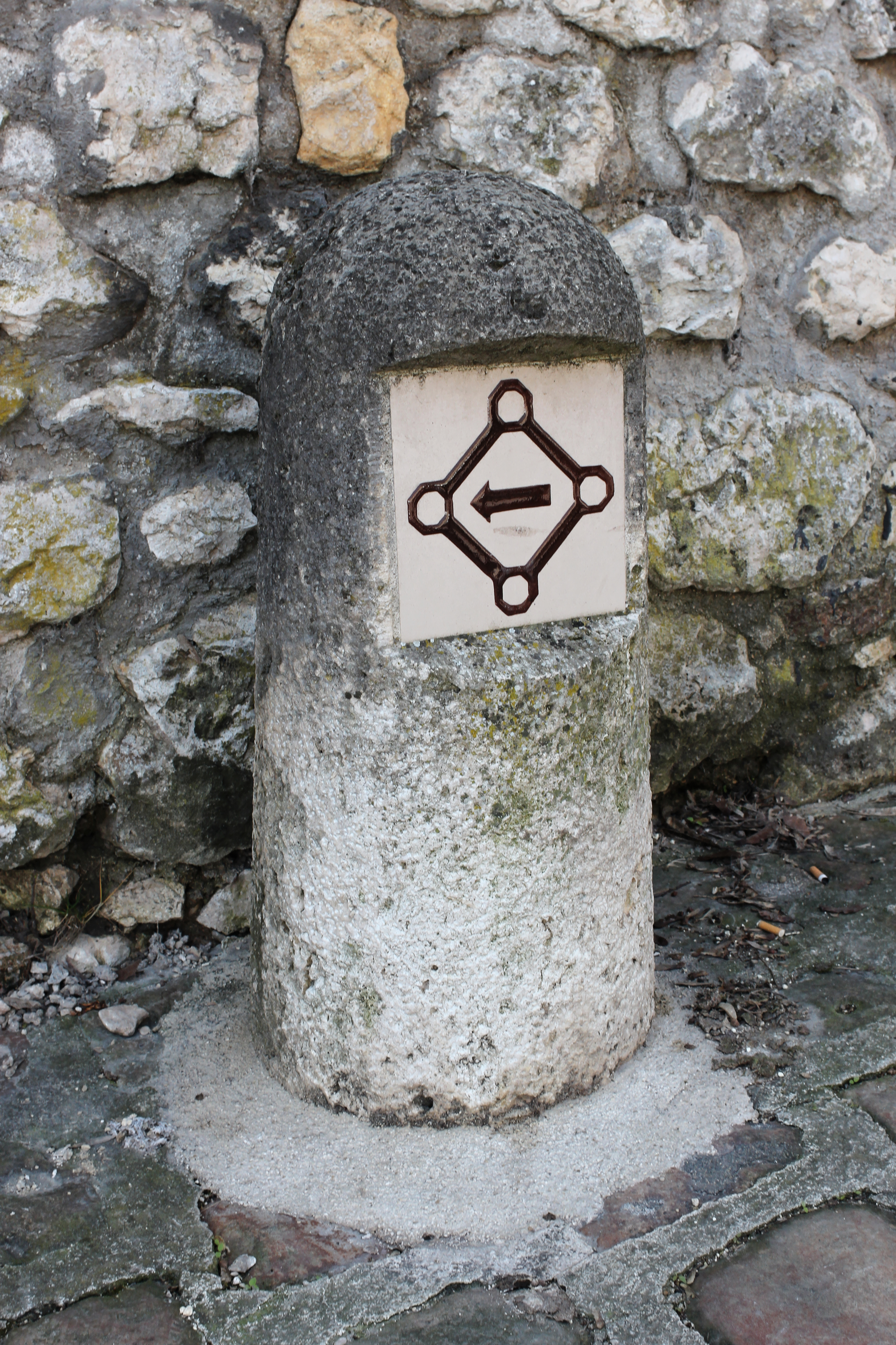 Borne en pierre indiquant le circuit touristique, rue Saint-Thibault à Provins.